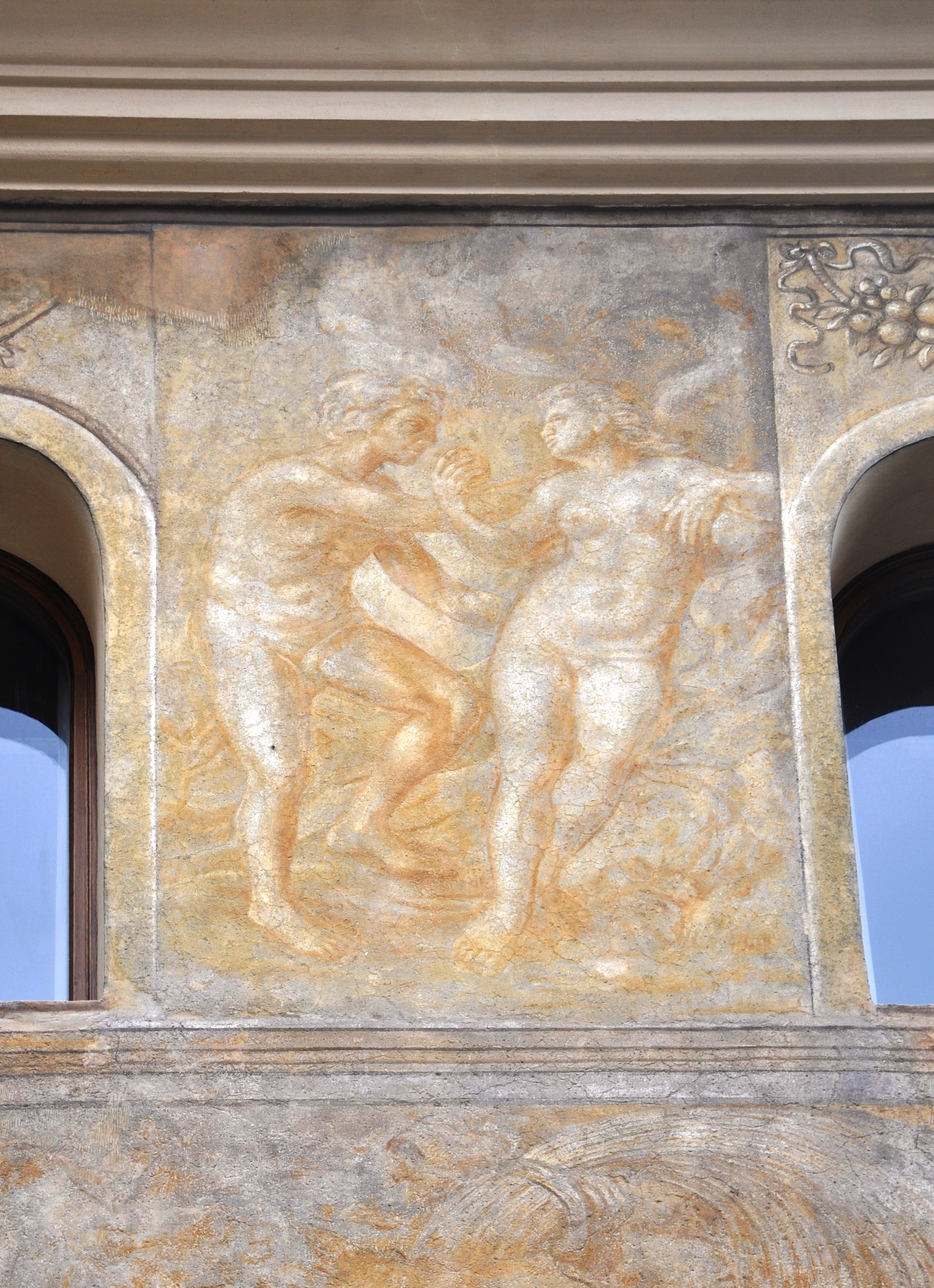 Sgrafitová renesanční výzdoba paláce Granovských v Ungeltu. Nejspíš Adam a Eva.